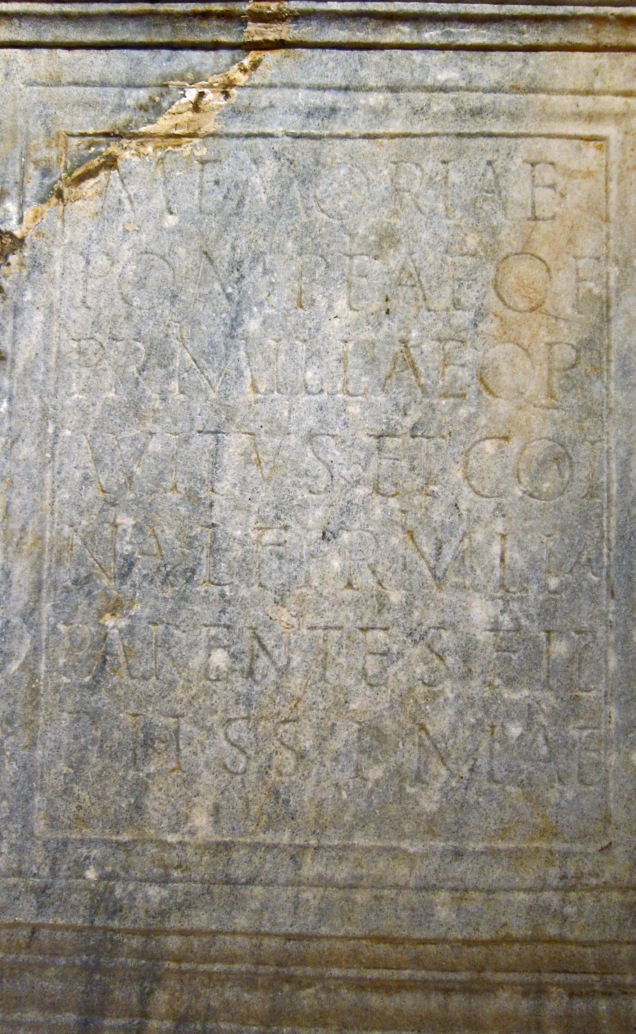 Saint-Girons (Ariège, France) : Inscription latine d'époque romaine. Épitaphe du cippe funéraire de Pompeia Primilla conservé au château des Vicomtes. CIL XIII, 11001 ; CAG-09, p.139 (d'où AE 1996, 1042.